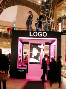 Merchandising: podium de lancement d'un parfum et animation défilé de mode (création Christine CLEMENT).